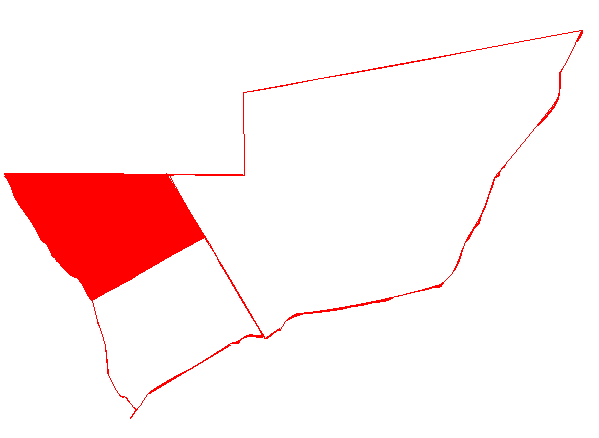 Situación de la parroquia Rafael María Baralt, dentro del Municipio Simón Bolívar (Zulia)